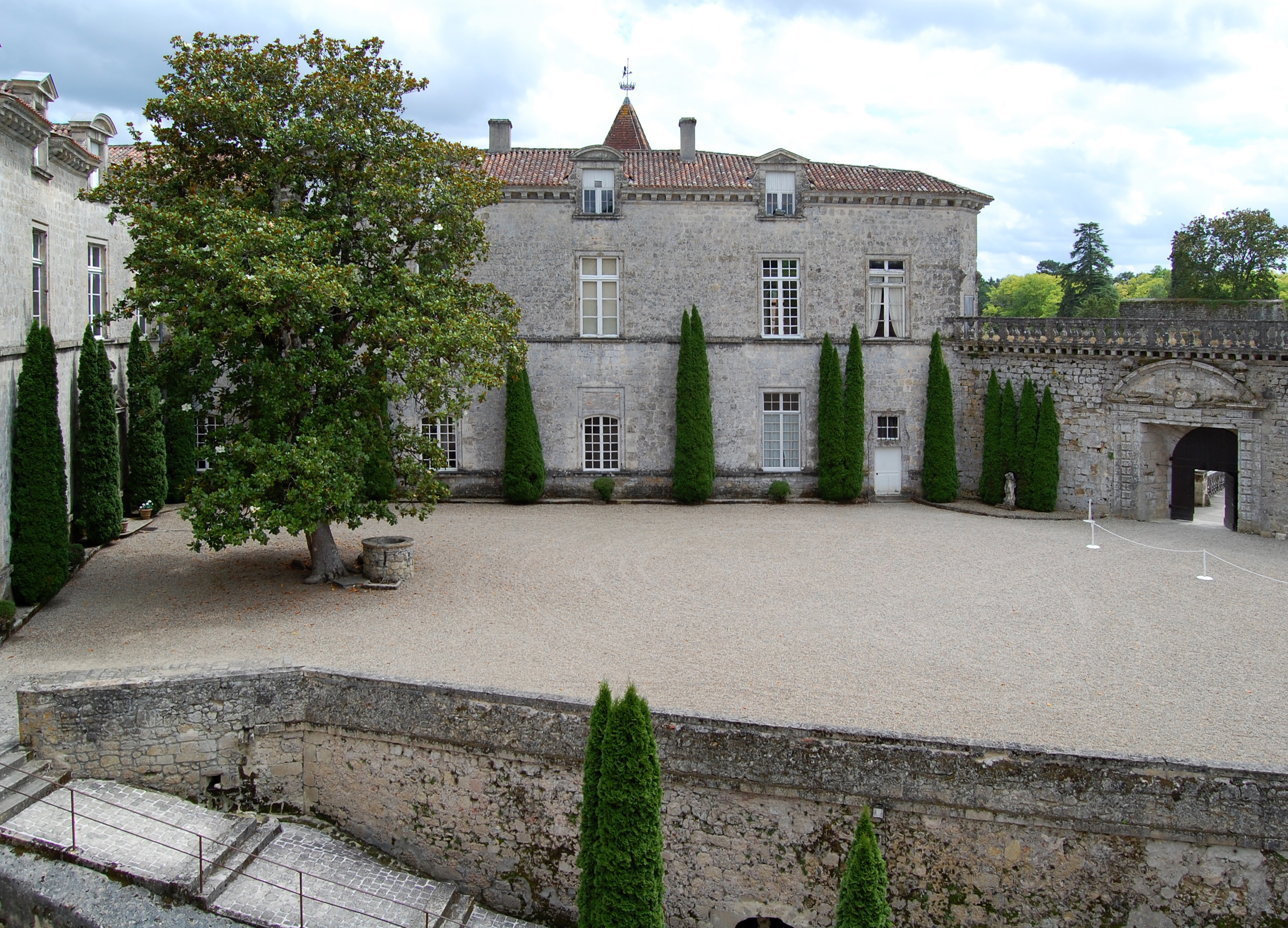 Cour du château de Cazeneuve (17ème siècle), Gironde, France. .